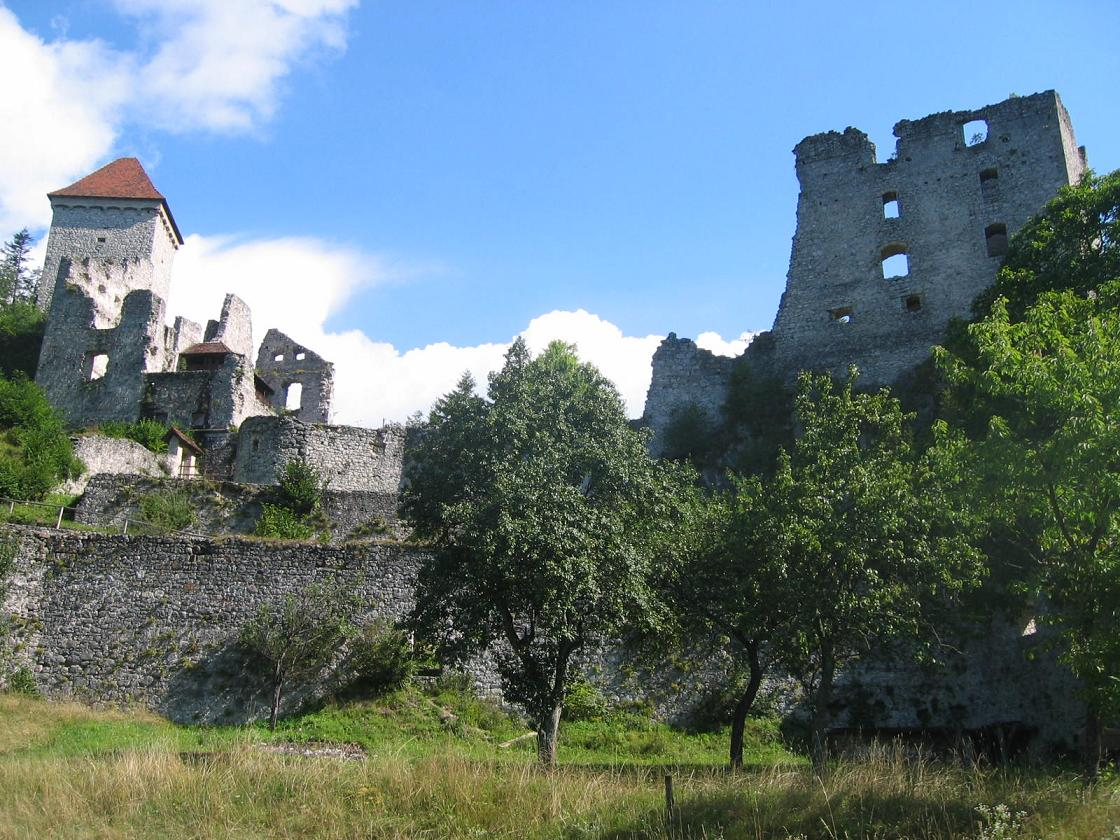 Grad Kamen, castle in Slovenia (near Begunje) photo:Ziga 09:37, 25 October 2006 (UTC)